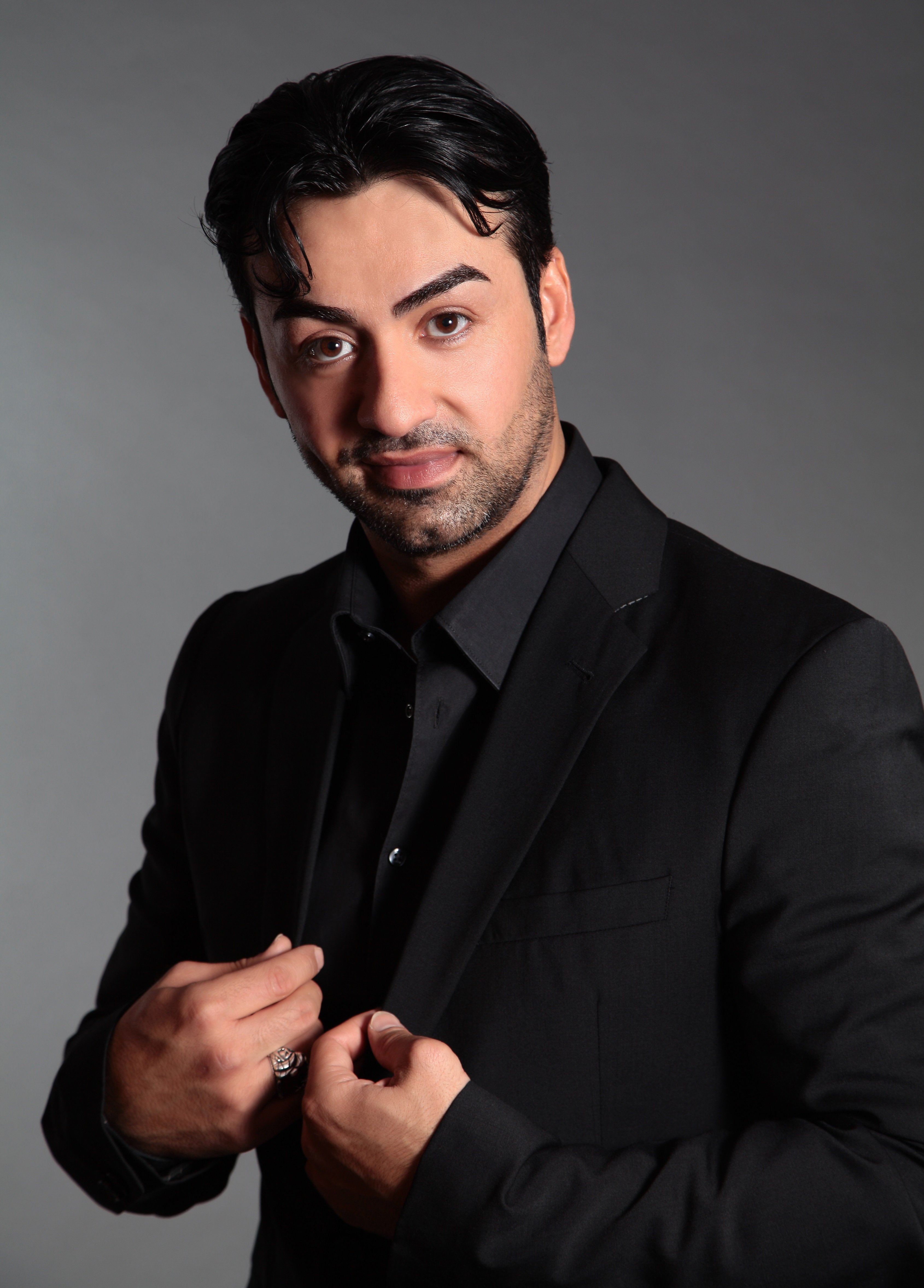 Fotoshooting himself